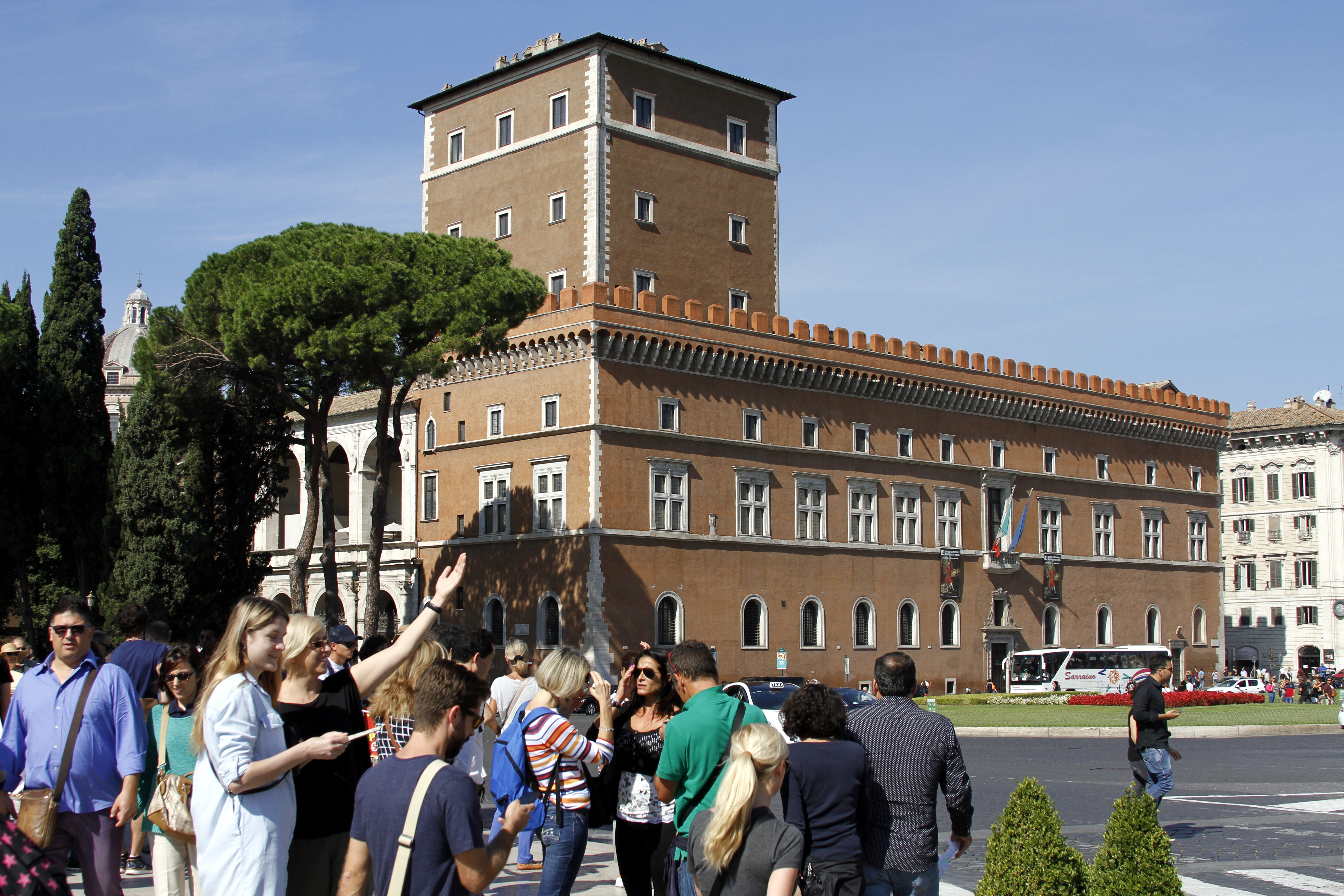 Palazzo Venezia - Rome